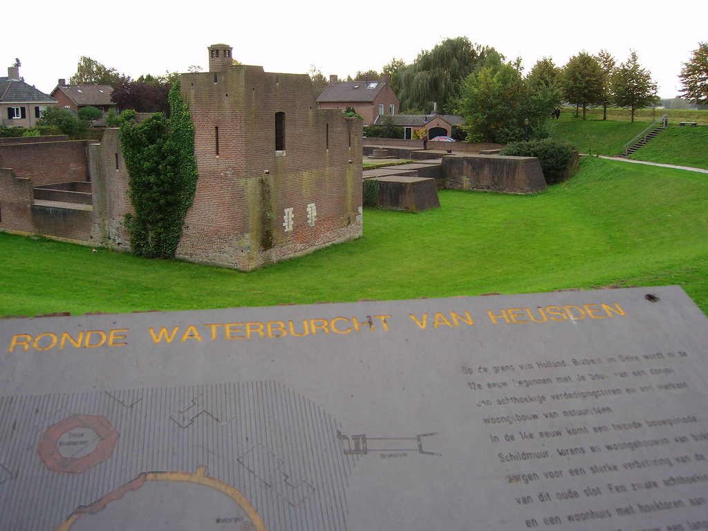 Zicht op een deel van de ruine van het voormalige Kasteel Heusden in Heusden